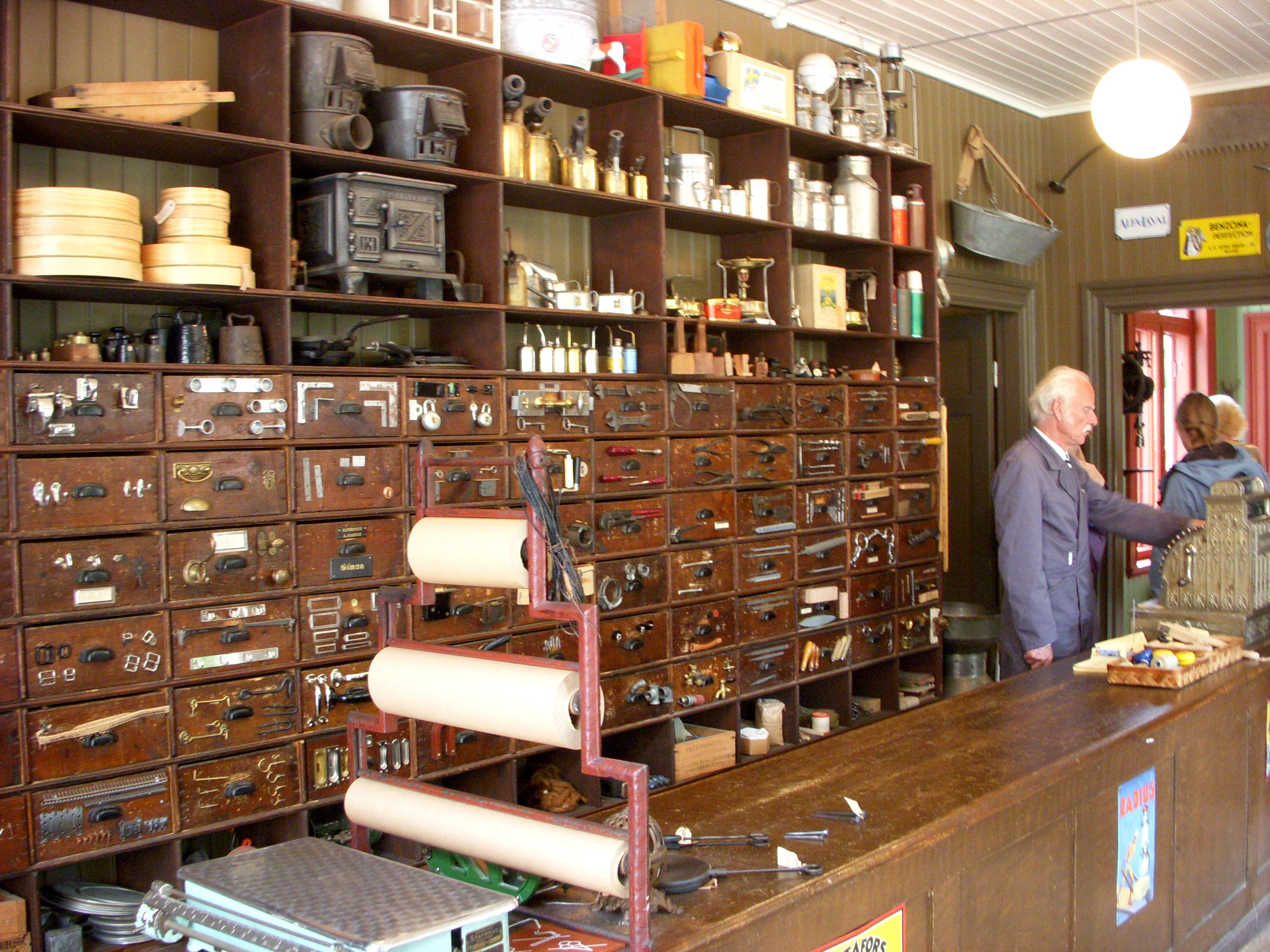 Järnhandlaren på Skansen i Stockholm